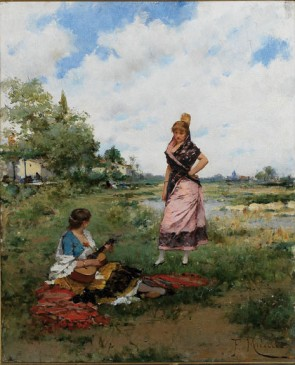 The guitarist